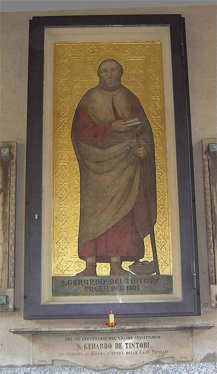 Monza immagine votiva di San Gerardo in via Carlo Antonietti 7 all'ingresso delle omonime case popolari